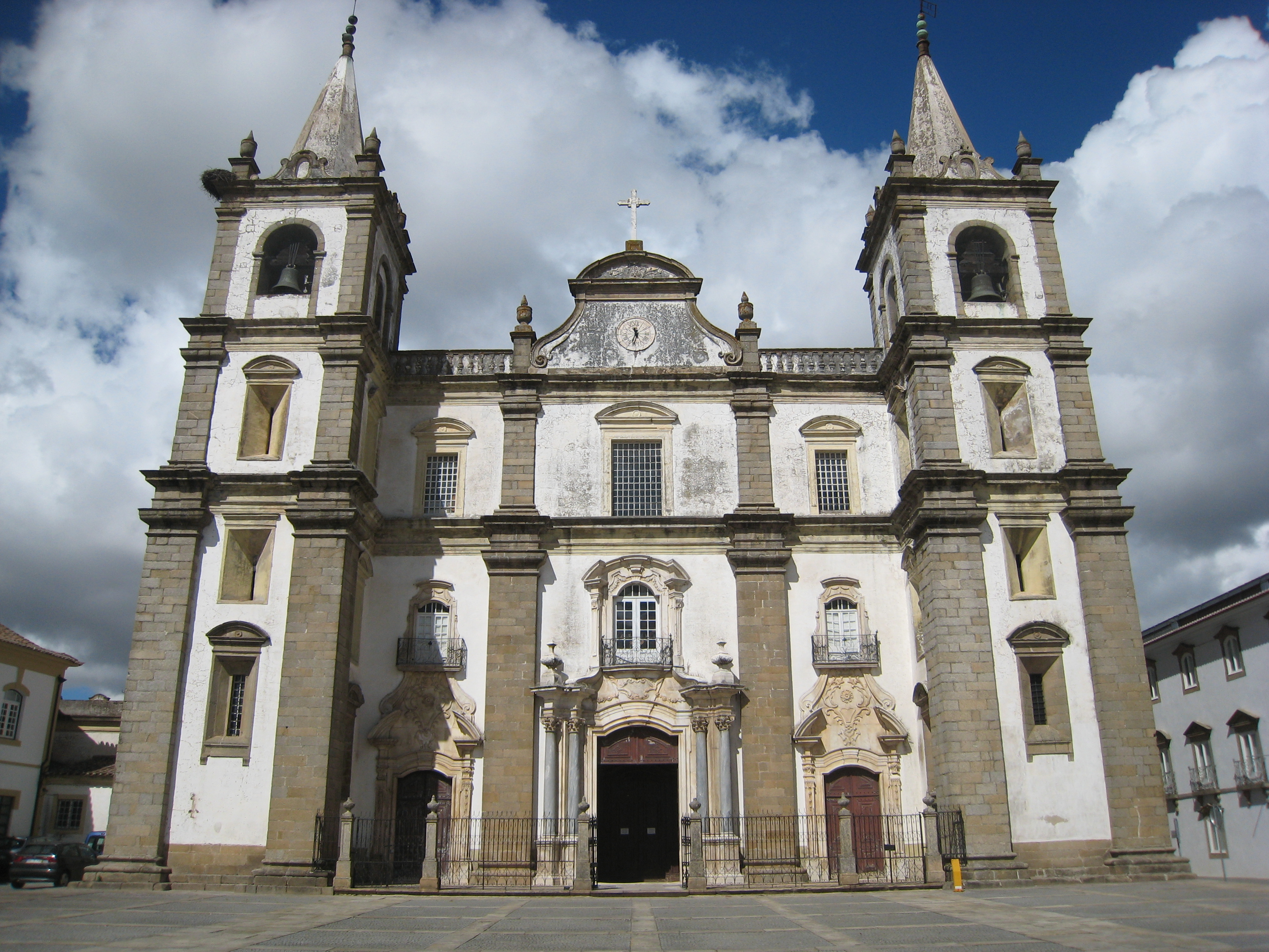 Portalegre, Portugal.